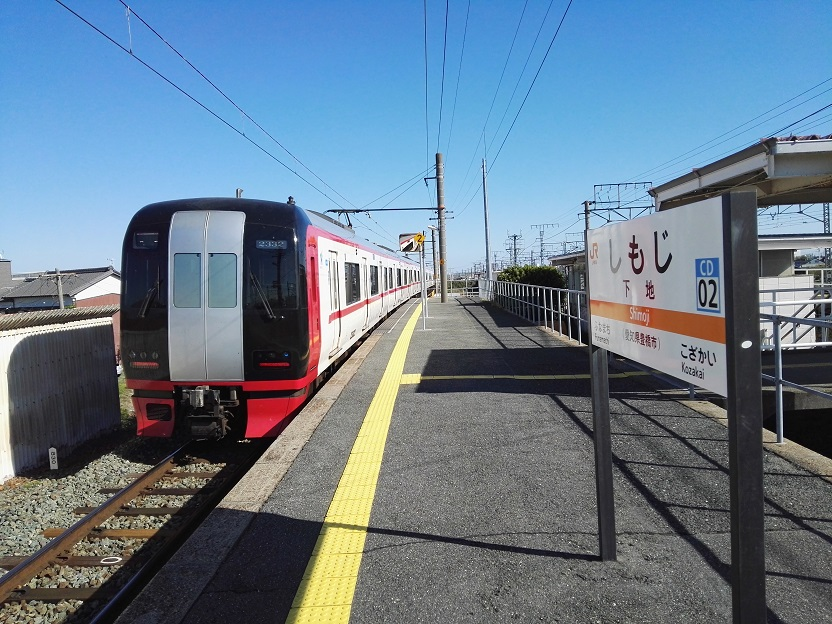 Shimoji station platform with Meitetsu train